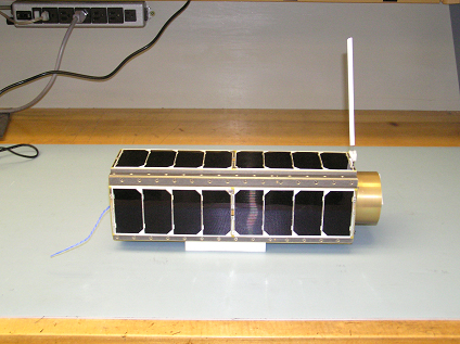 Genesat 1 research Cubesat